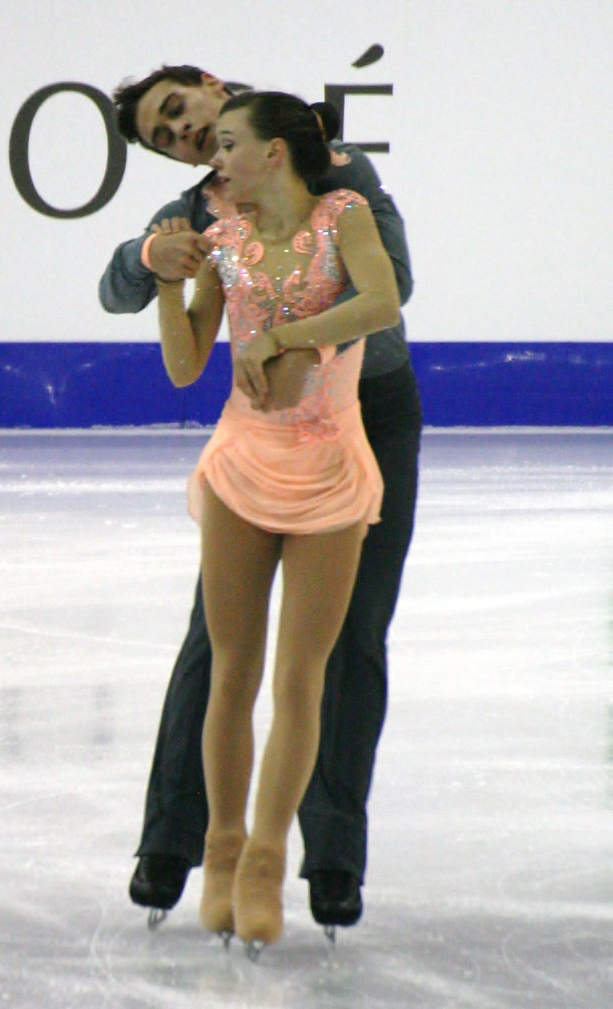 Анна Душкова и Мартин Бидар (Чехия) на финале Гран-при по фигурному катанию среди юниоров 2015-2016.